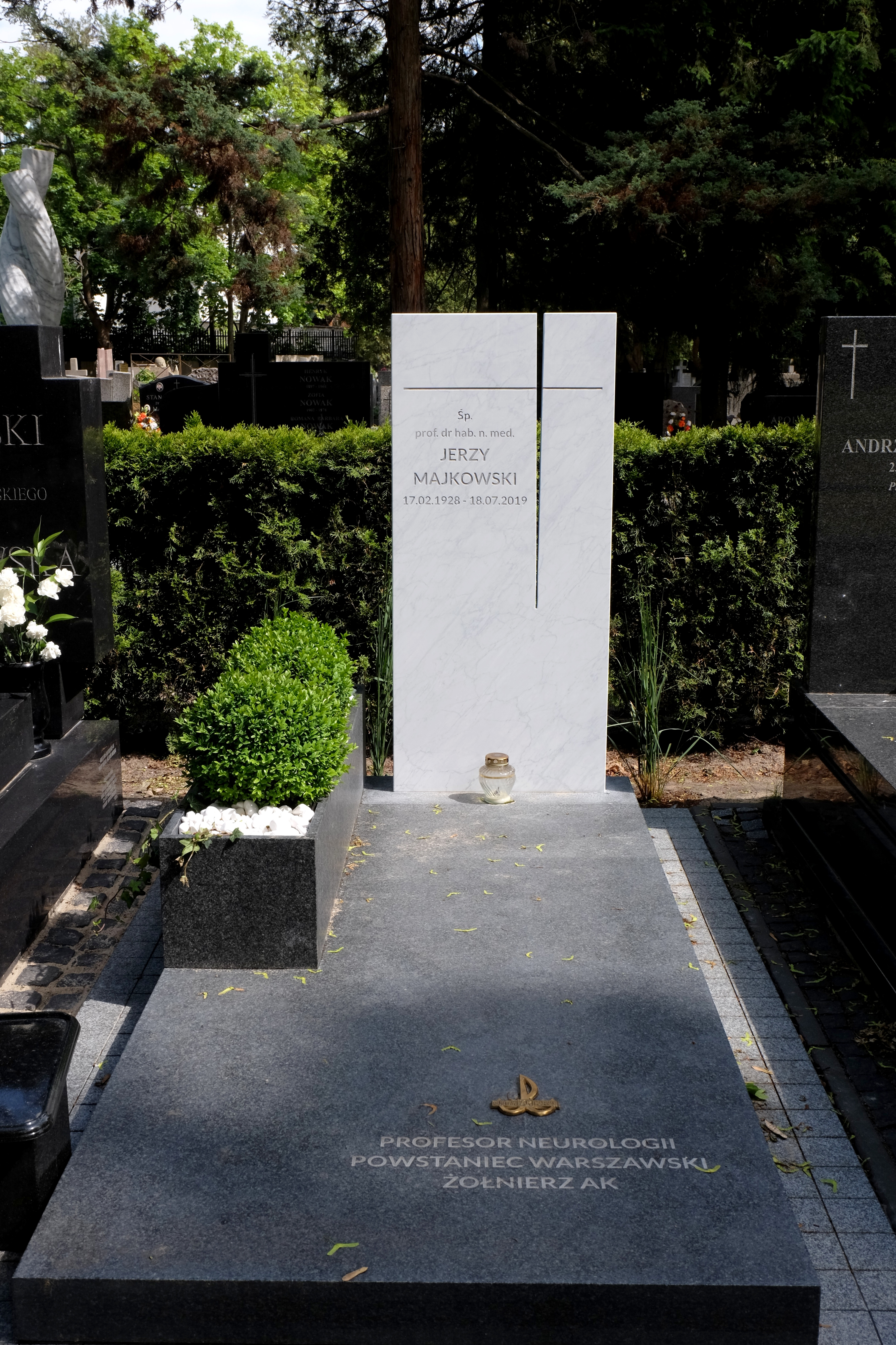 Grób profesora Jerzego Majkowskiego na Cmentarzu Wojskowym na Powązkach w Warszawie